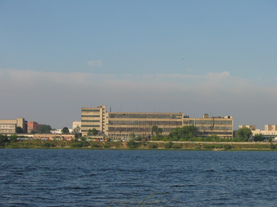 skats no Katlakalna uz Kvadrātu